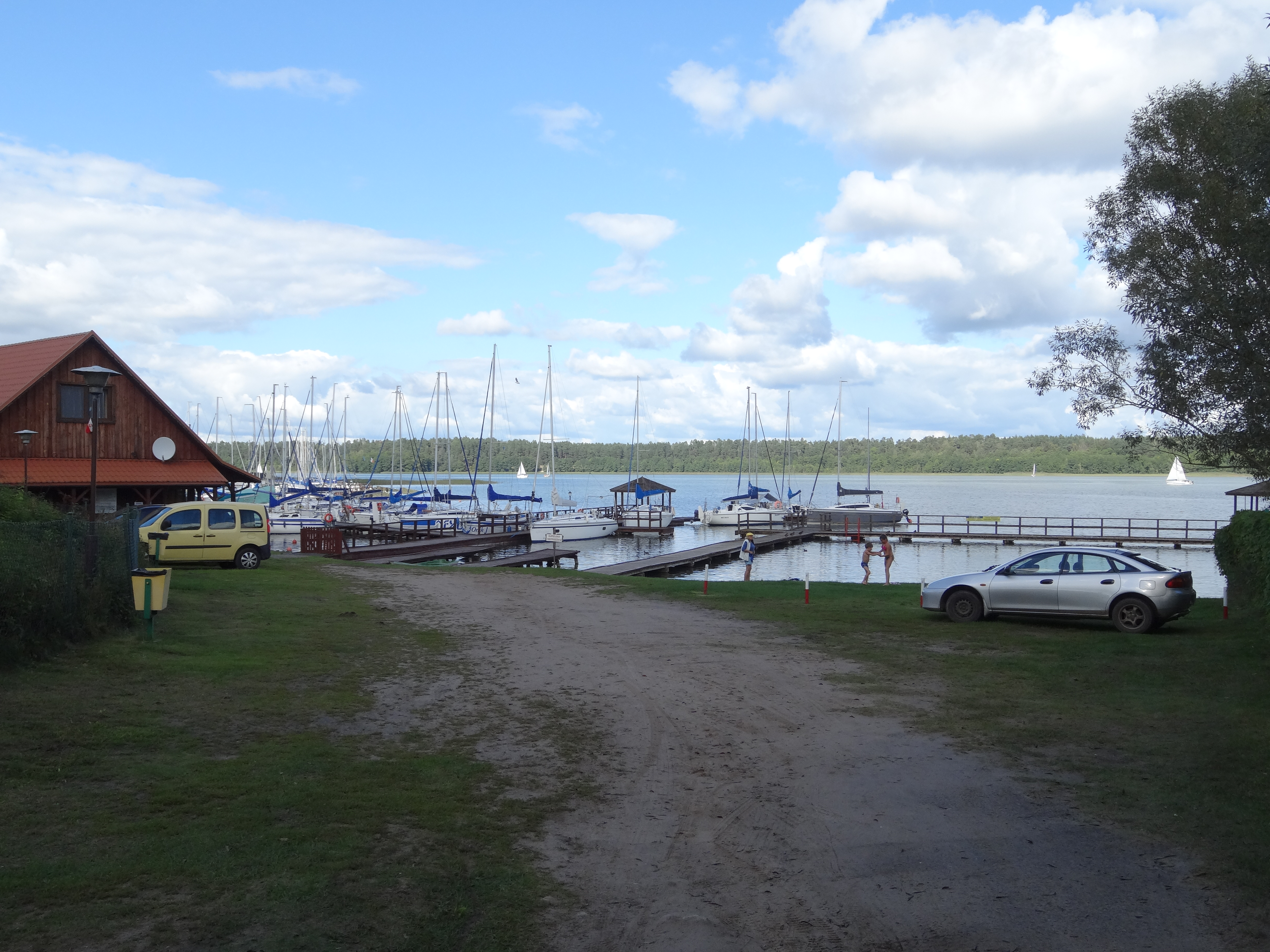 Krzyże, Poland